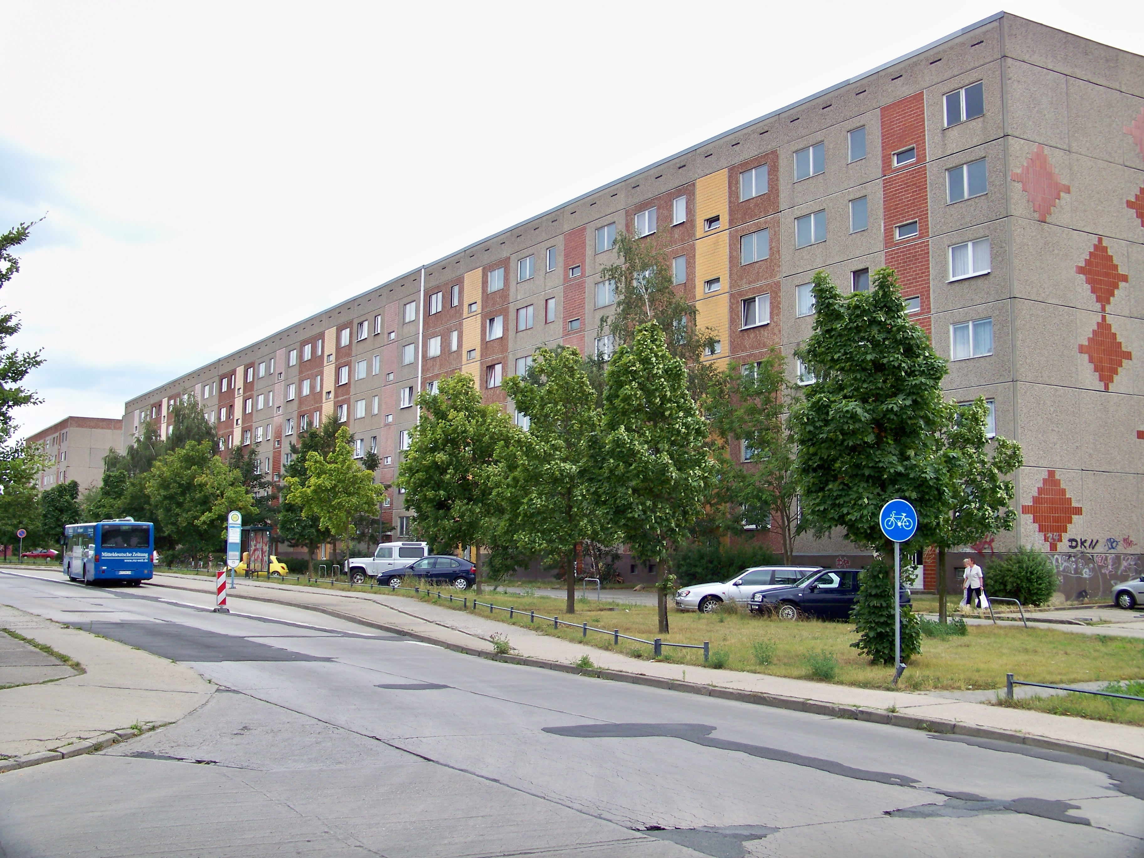 Wolfen-Nord, Auenplatz